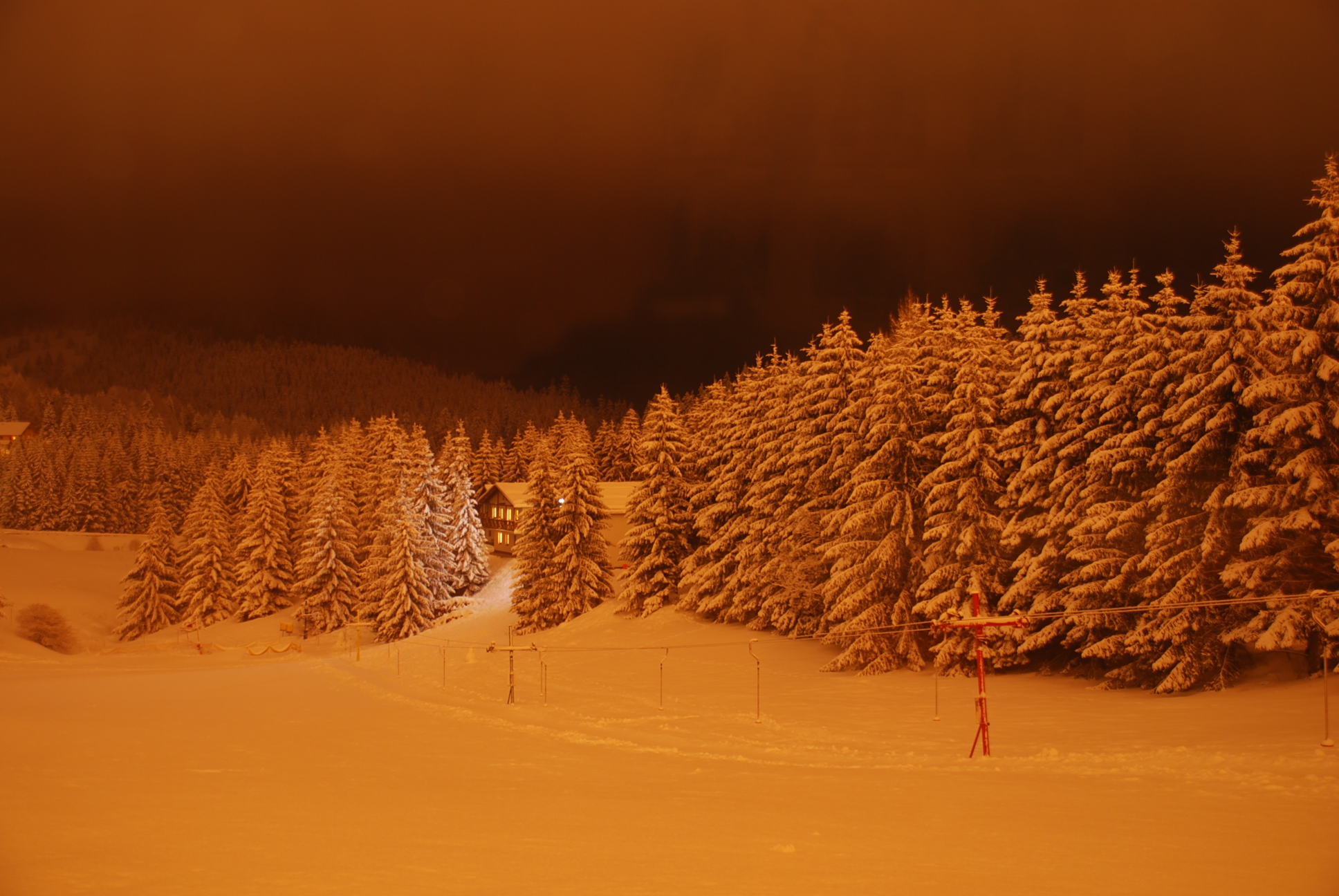 Dóvali tájkép éjjel (Donovaly), Szlovákia